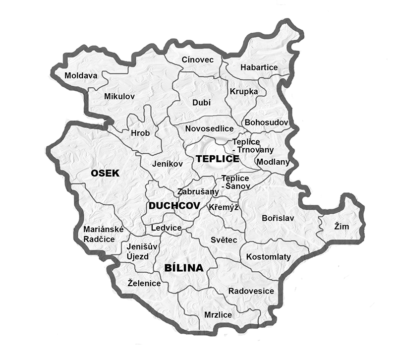 Diecéze litoměřická, teplický vikariát - farnosti